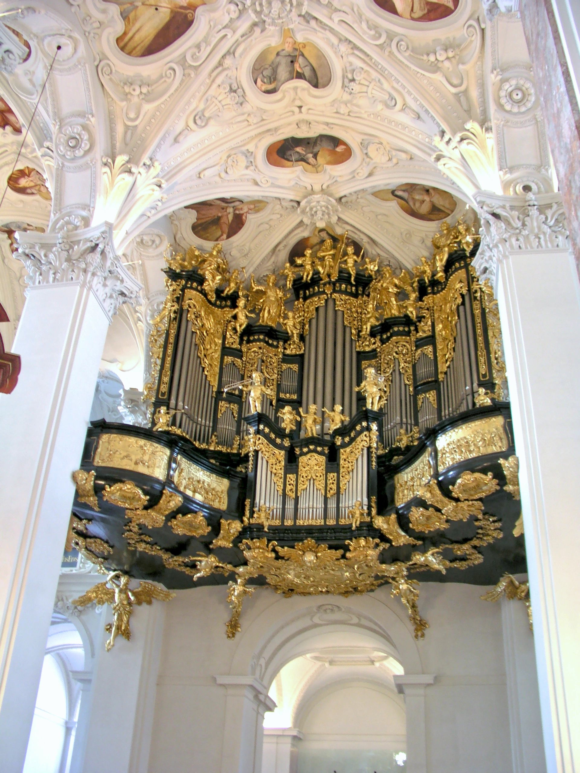 Basilika Minor, Pfarr- und Wallfahrtskirche Maria Geburt mit Kirchhof